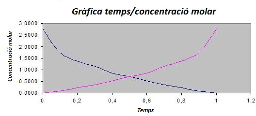 Exemple de gràfica qualsevol amb l'evolució de la concentració respecte el temps.